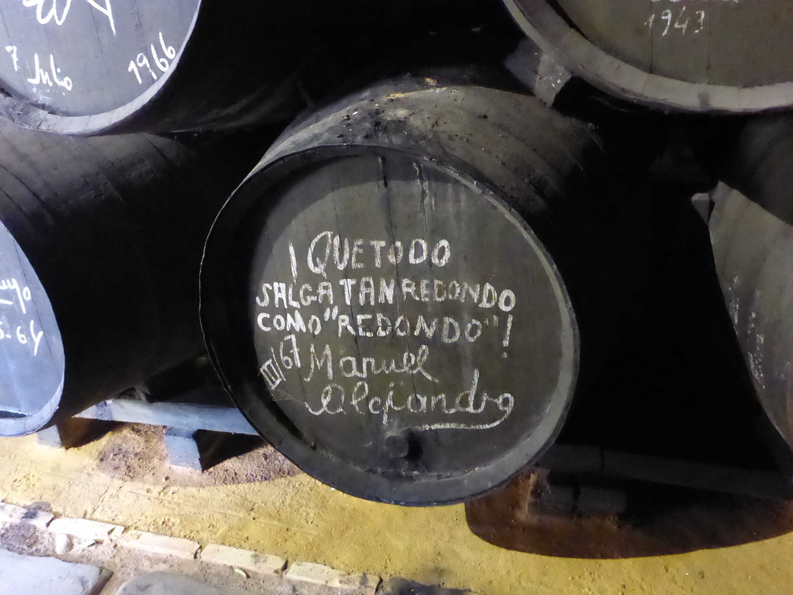 Bodegas Domecq-Fundador en Jerez de la Frontera (España)